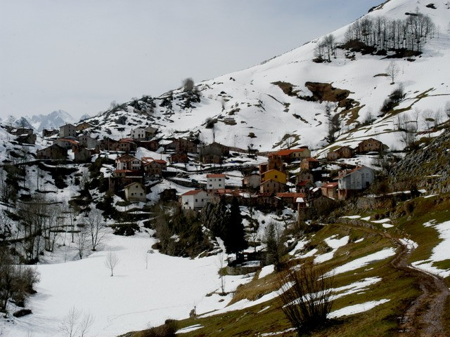 Tresviso © jlgomezlinares